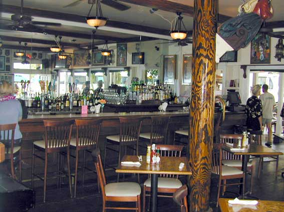 Der Pionee-Inn in Lahaina (Maui/Hawaii) eine über 100jährige Walfängerkneipe